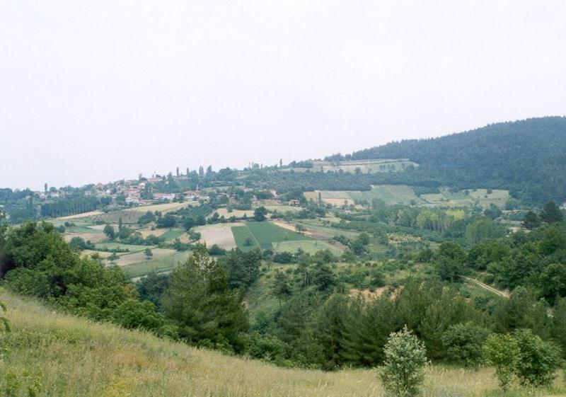 Köklük'ten çektiğim fotoğraf